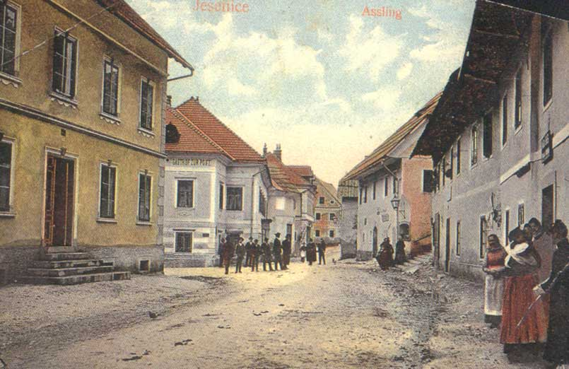 Razglednica Jesenic.